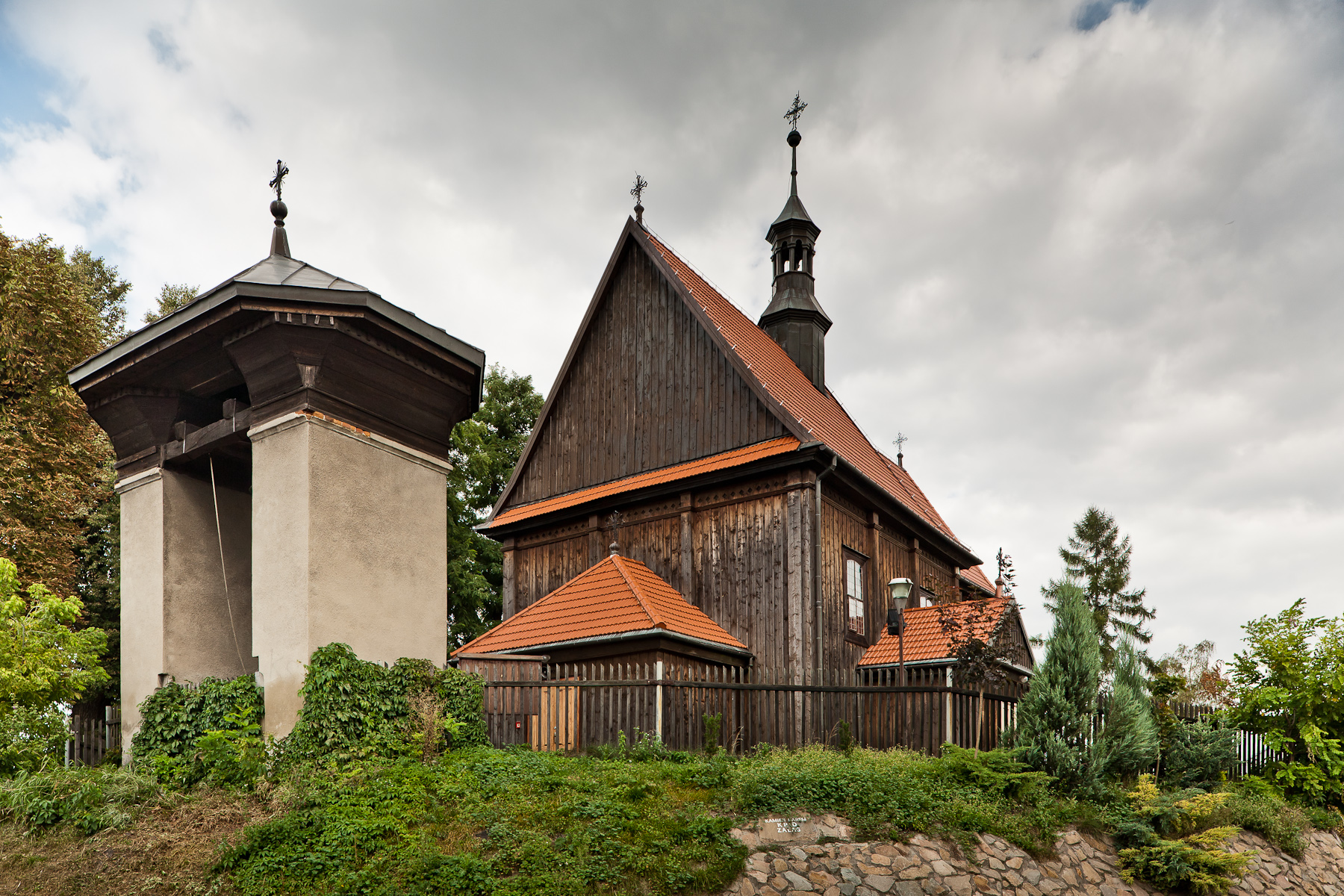 Kościół par. p.w. św. Mikołaja w Czulicach - widok ogólny